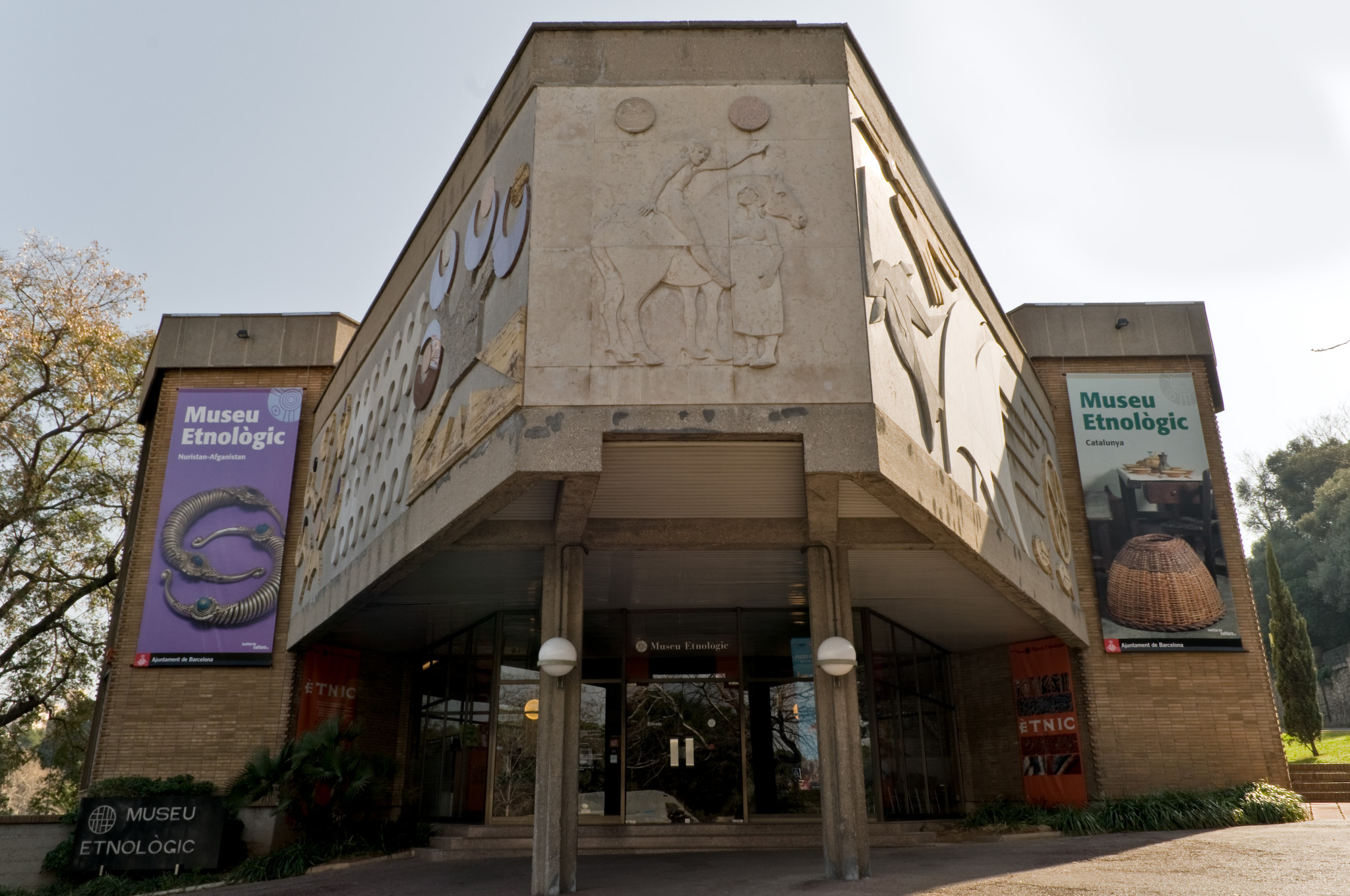 Façana del Museu Etnològic de Barcelona. Arquitecte: Jaume Puigdengoles. Direcció: Passeig de Santa Madrona, 16-22